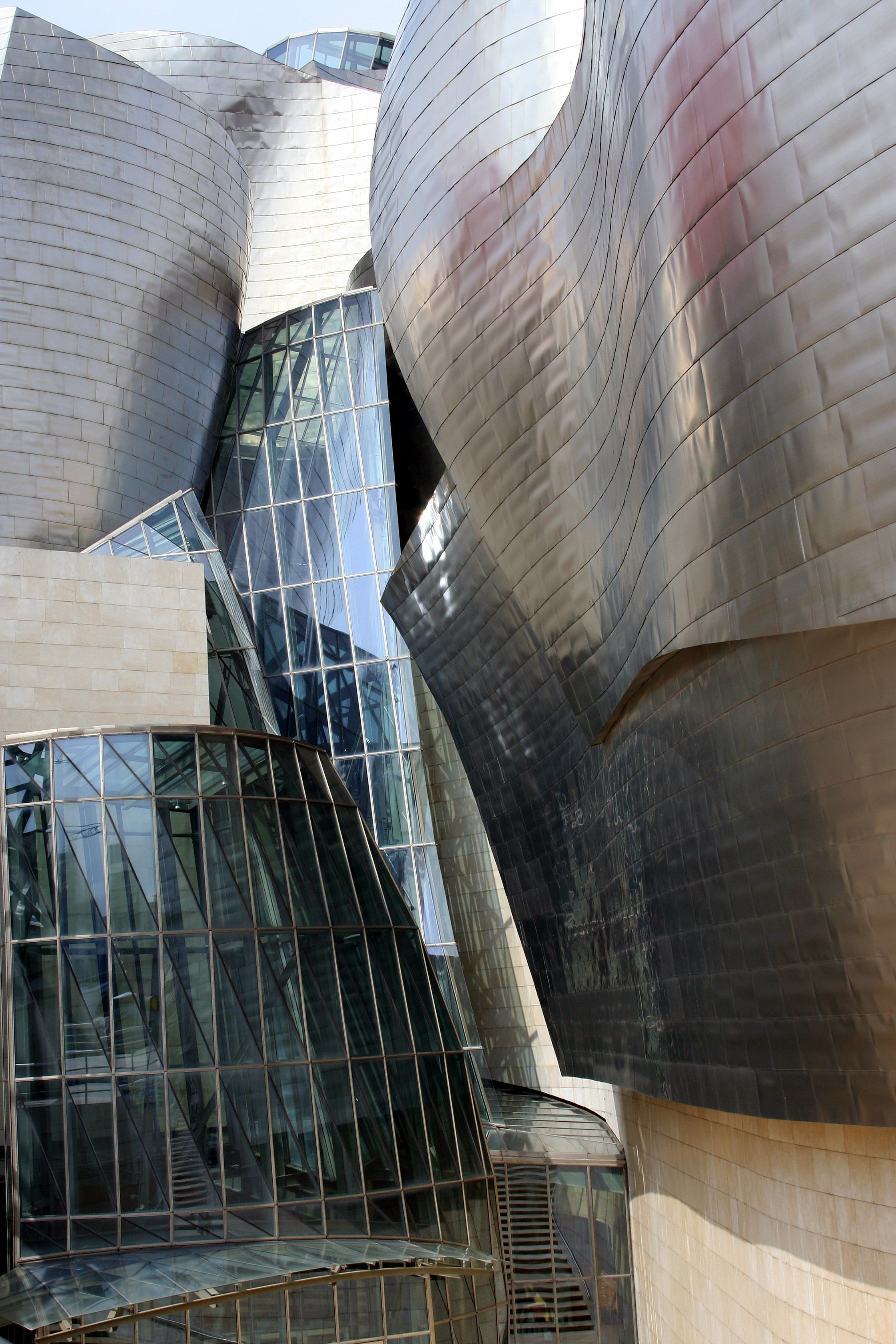 Guggenheim Museum Bilbao